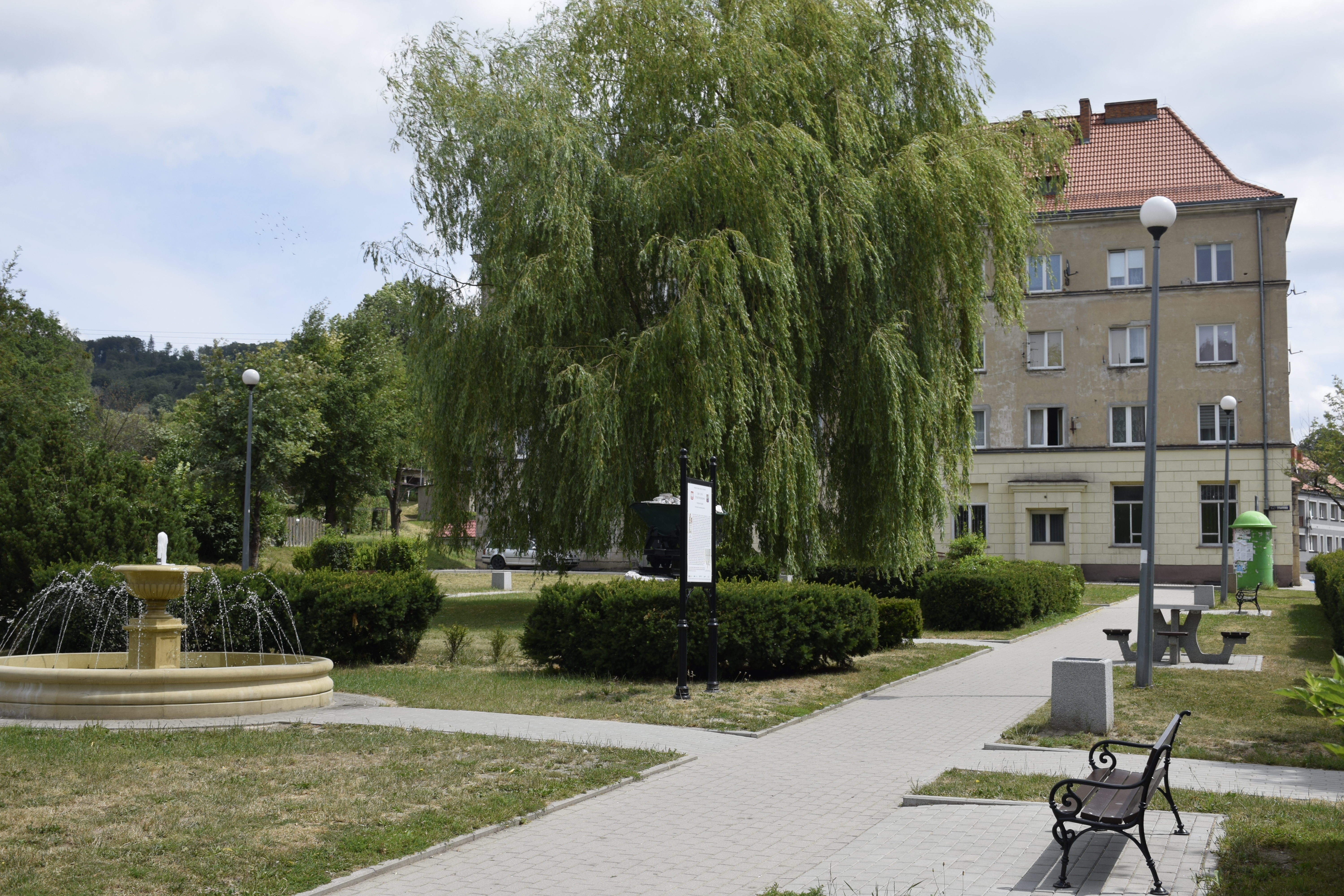 Wojcieszów. Polska.